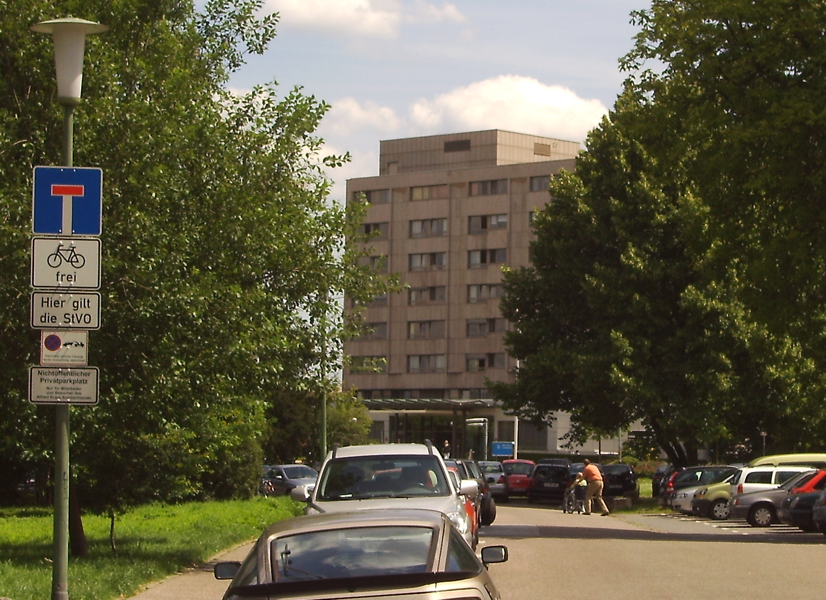 Alfried-Krupp-Krankenhaus bei der Siedlung Altenhof I, Essen-Rüttenscheid, 2007